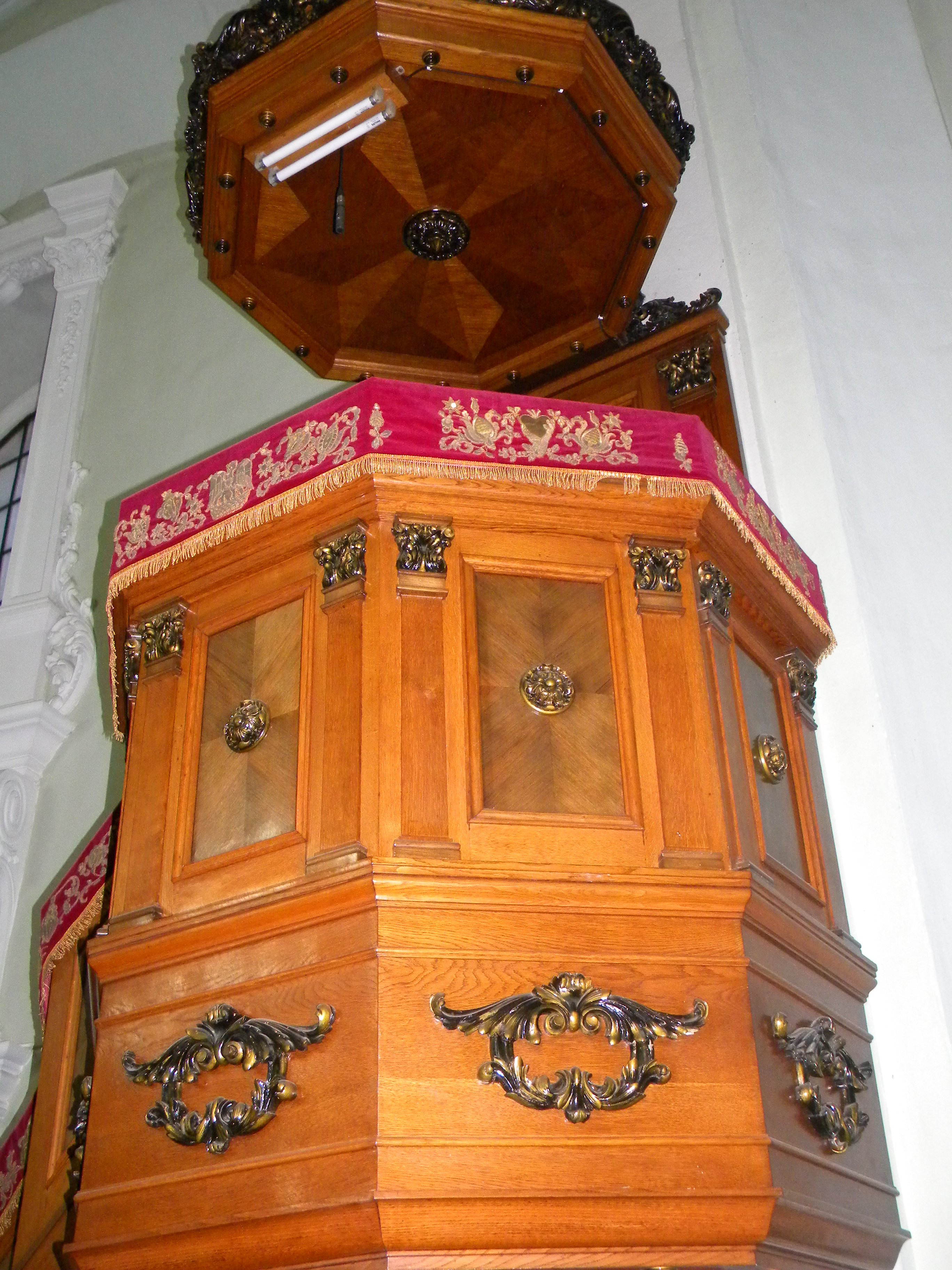 A Láncos templom szószéke (Szatmárnémeti)